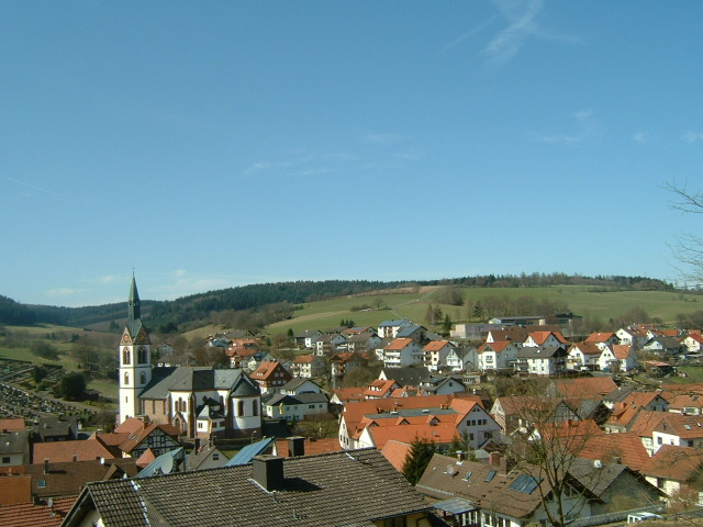 Oberndorf Jossgrund Germany Spessart